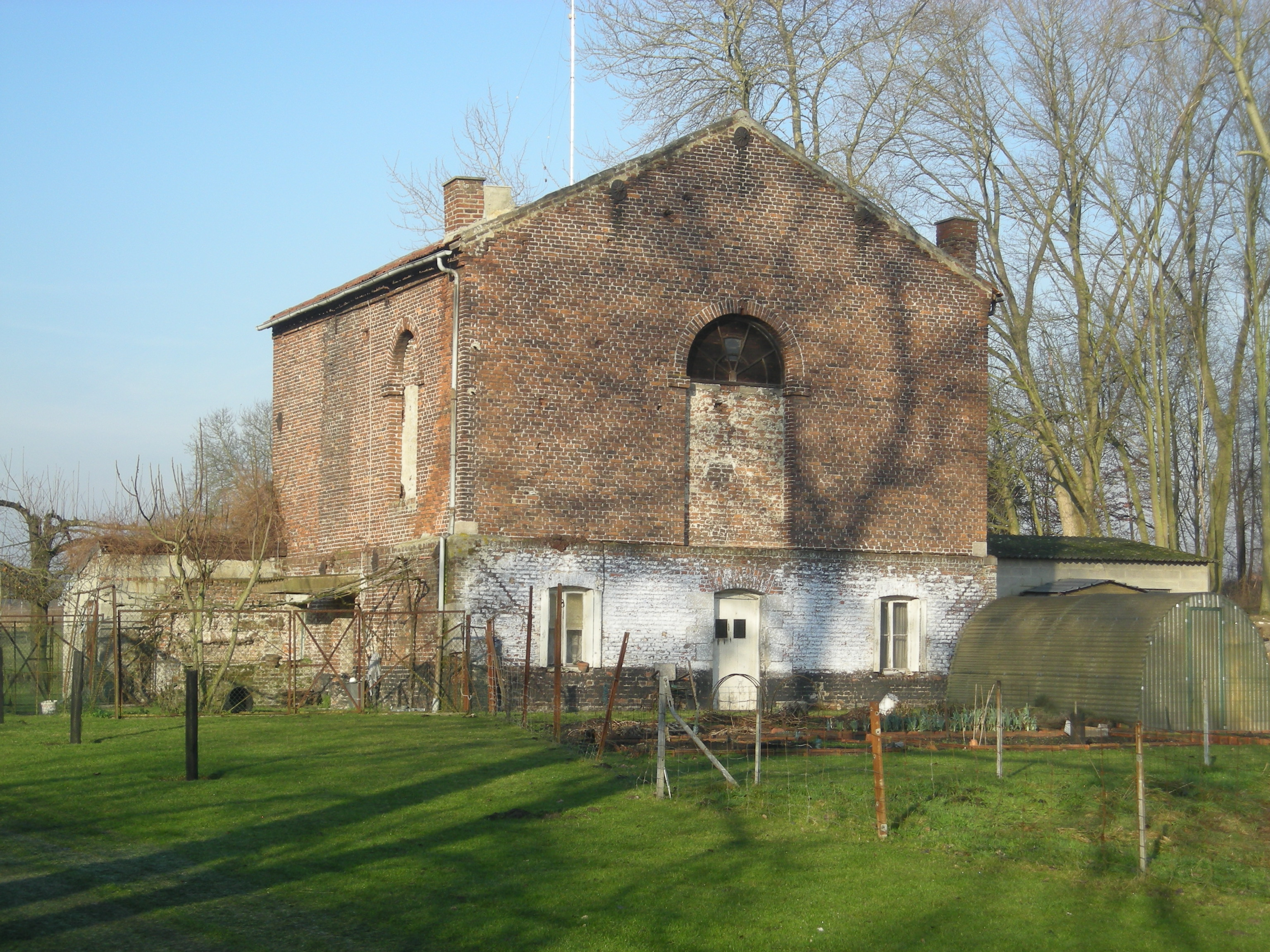 La fosse Sophie de la Compagnie des mines d'Anzin était un charbonnage du bassin minier du Nord-Pas-de-Calais constitué d'un seul puits situé à Hergnies, Nord, Nord-Pas-de-Calais, France. La fosse Sophie est inscrite sur la liste du patrimoine mondial par l'Unesco le 30 juin 2012 et y constitue en partie le site no 5.